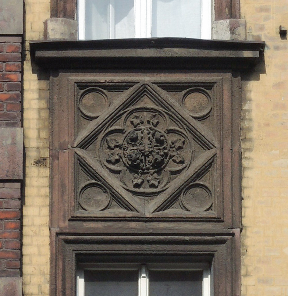 Kamienica przy ul. J. Kochanowskiego 13 w Katowicach, detal elewacji - płycina między oknami